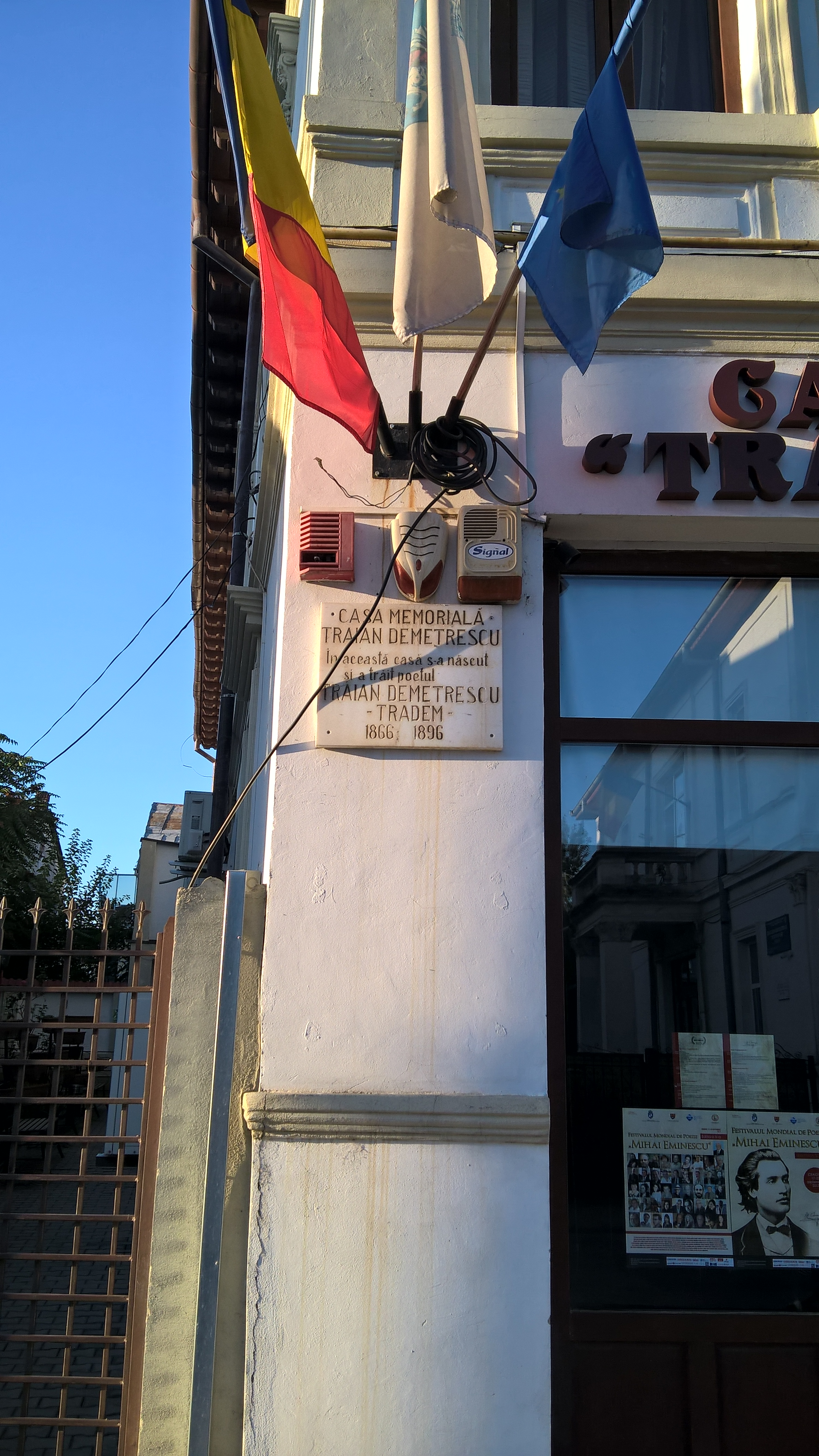 Casa Demetrescu